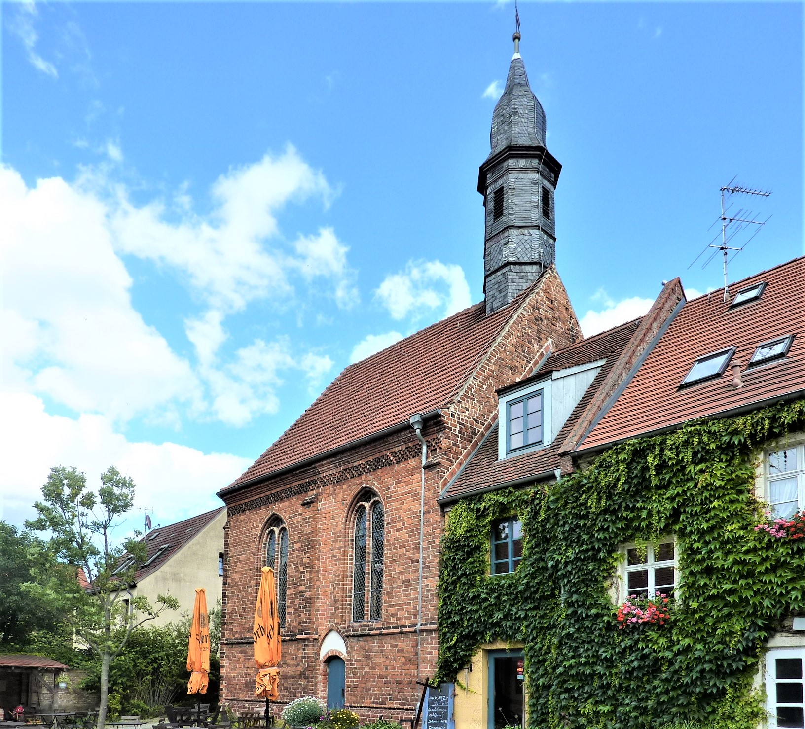 Siechenkapelle St Laurentius (Neuruppin)